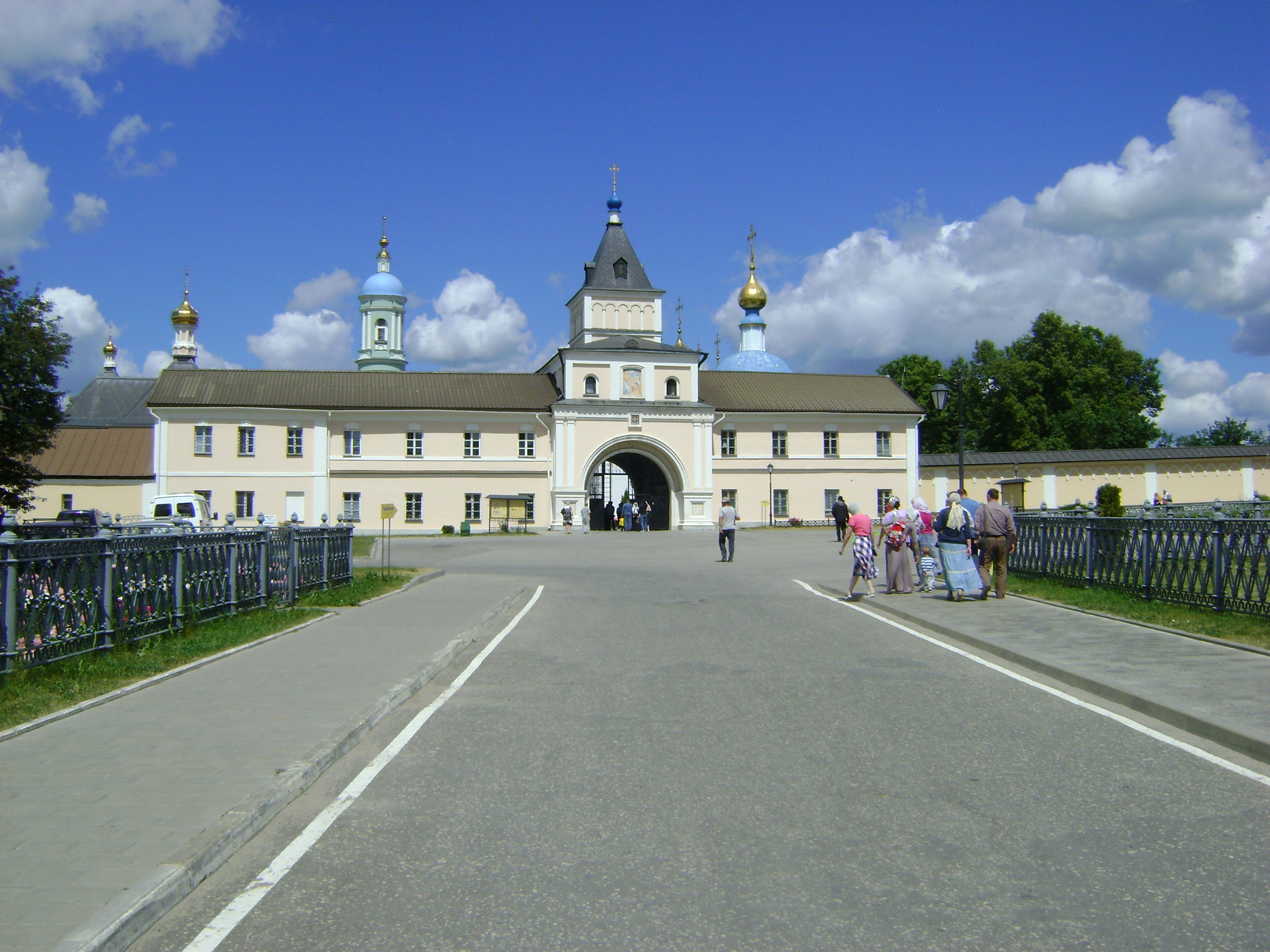 Вхід до Оптиної пустині.